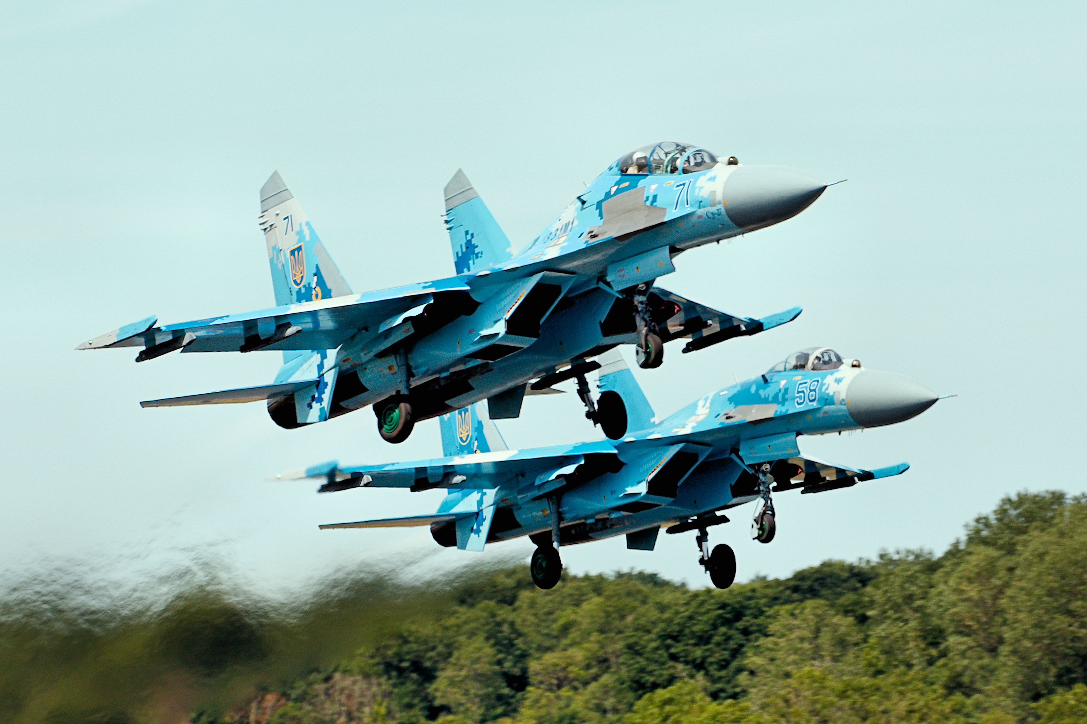 SU-27 Flankers - RIAT 2017